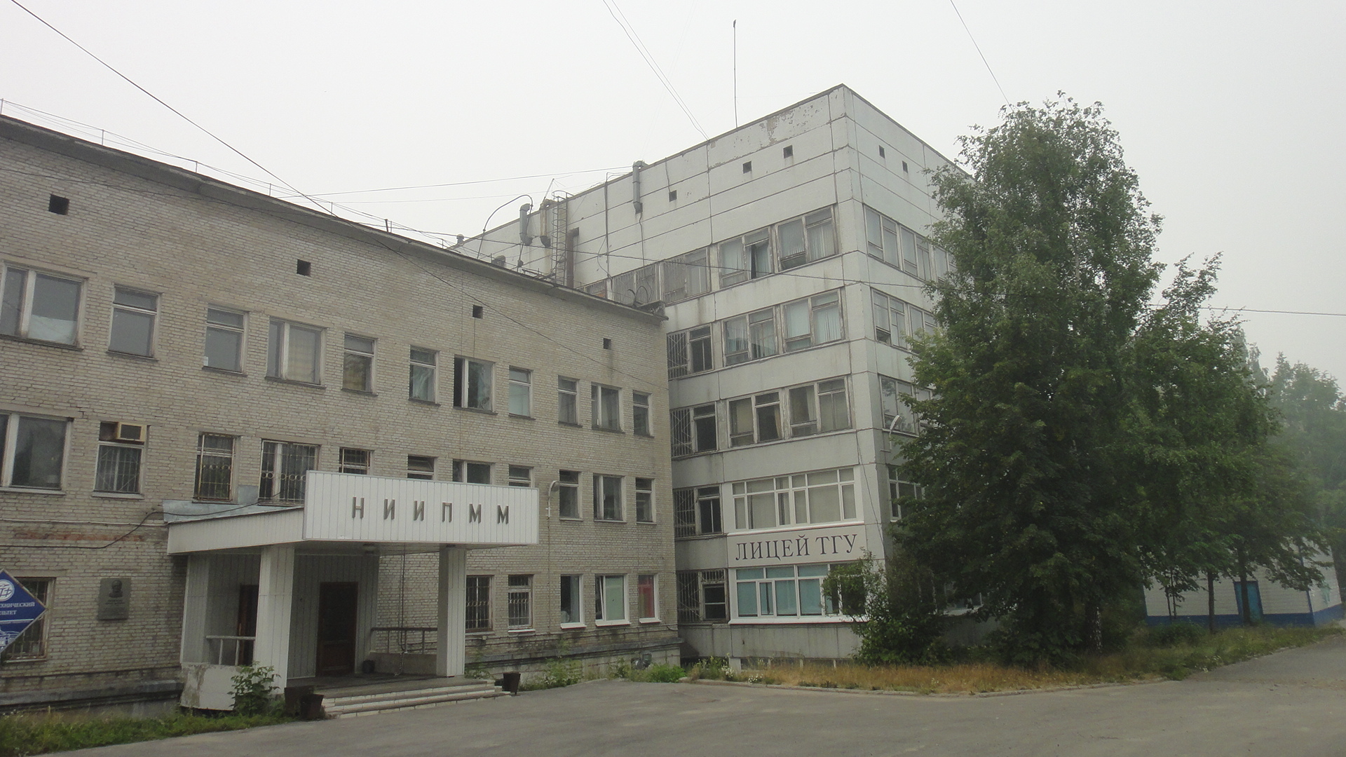 Здание ВЦ НИИ ПММ ТГУ